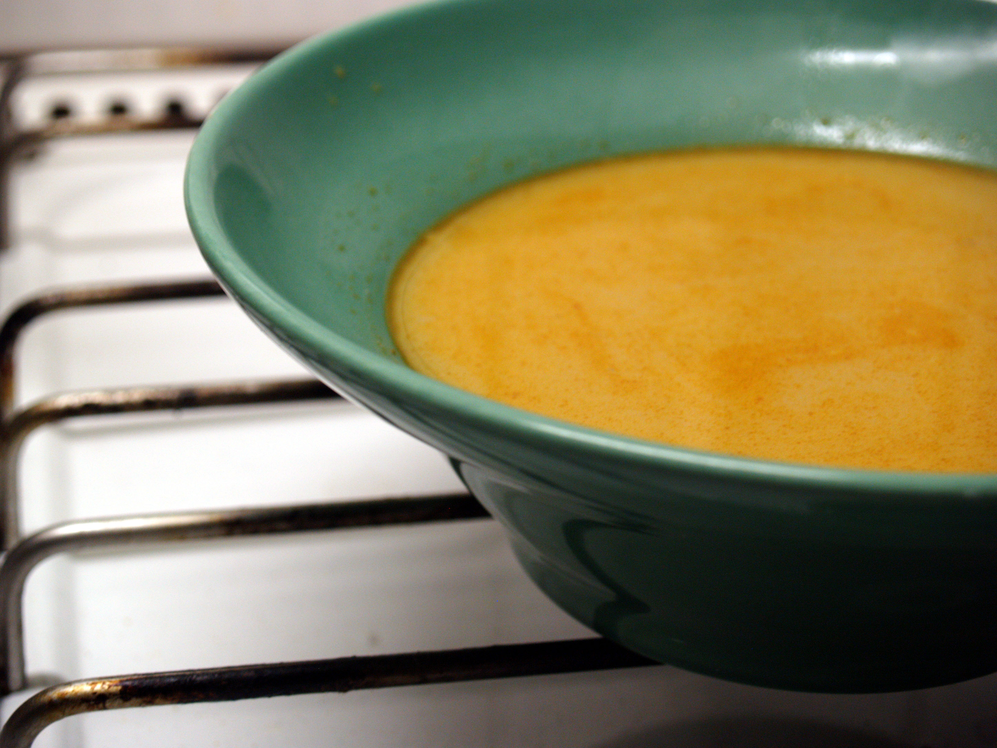 Fiskesuppe